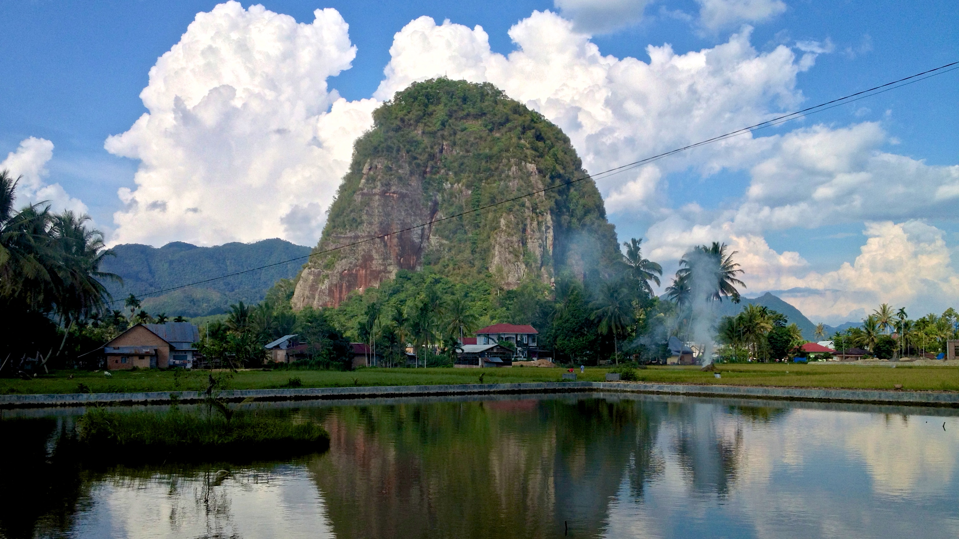 Bukik Bulek